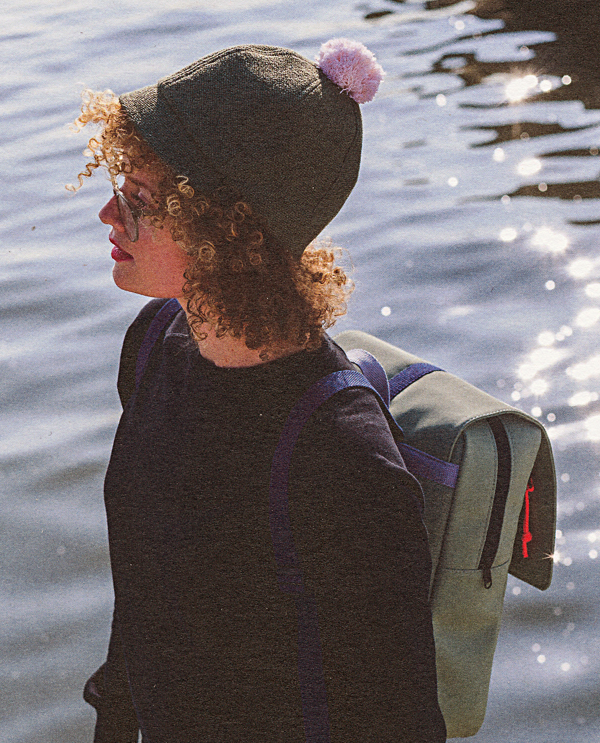 Kierrätyskankaasta valmistetusta Kombai-hatusta on tullut Costo Oy:n klassikkotuote.